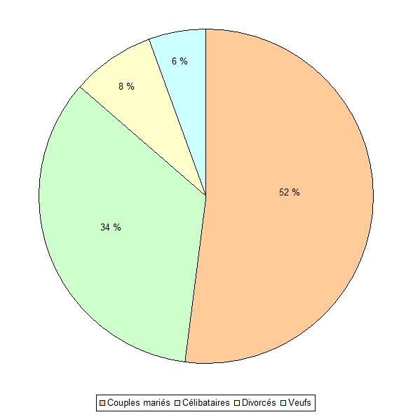 Composition de la population de Coupru (Aisne, France), en fonction du statut marital.